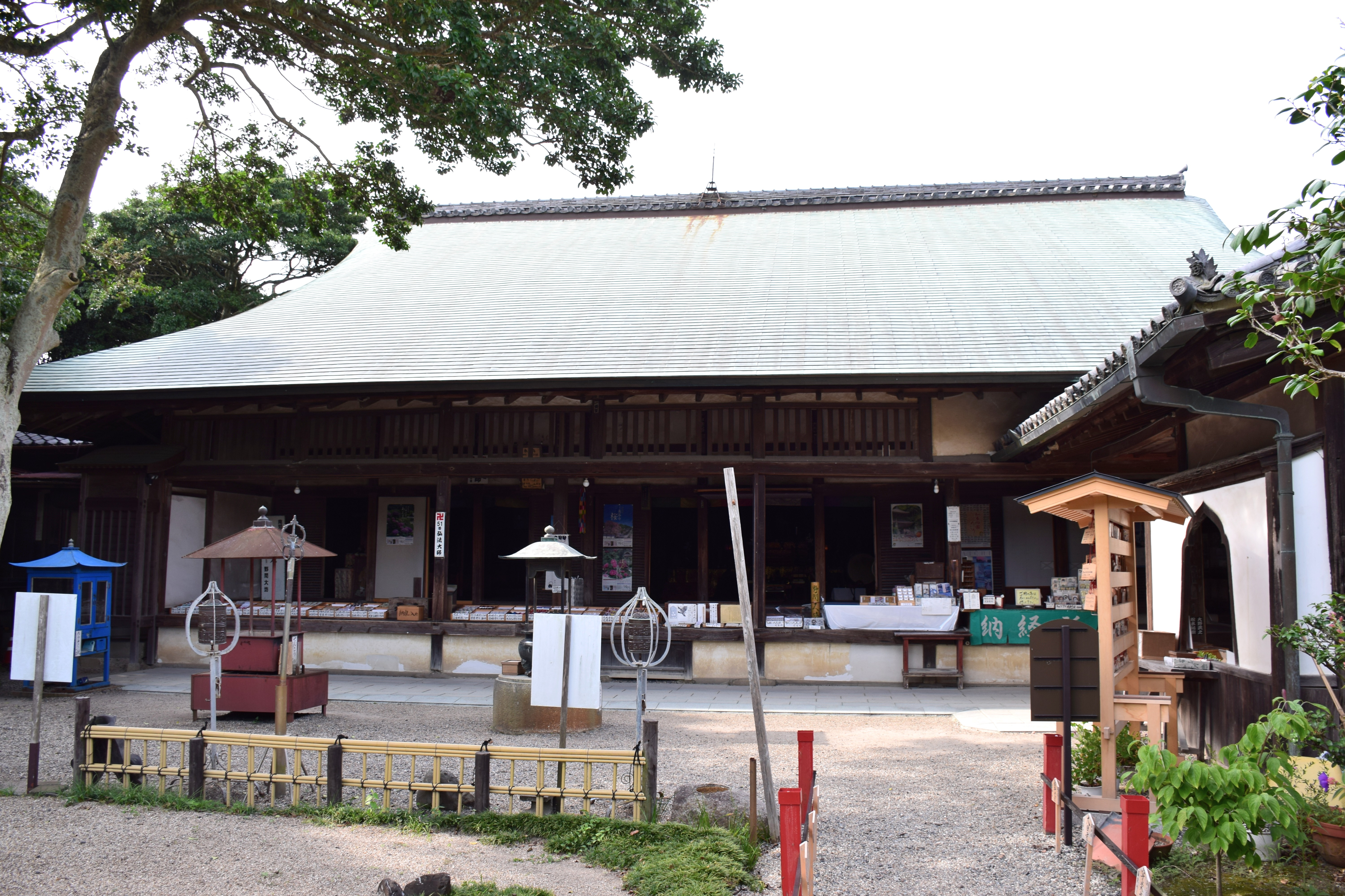 野間大坊客殿